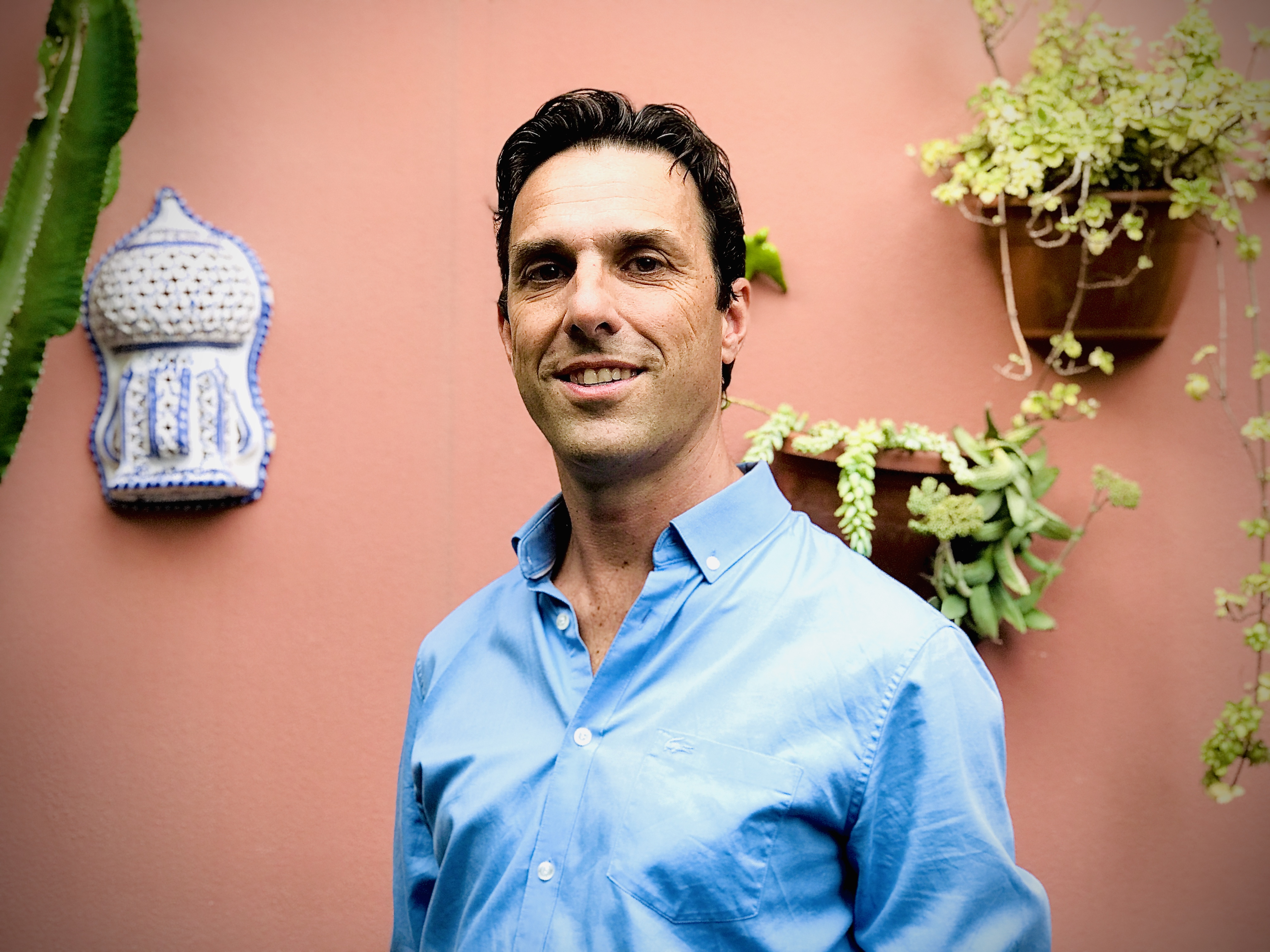 Paolo Pinna Parpaglia